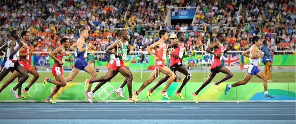 Perfil de Luis Ostos